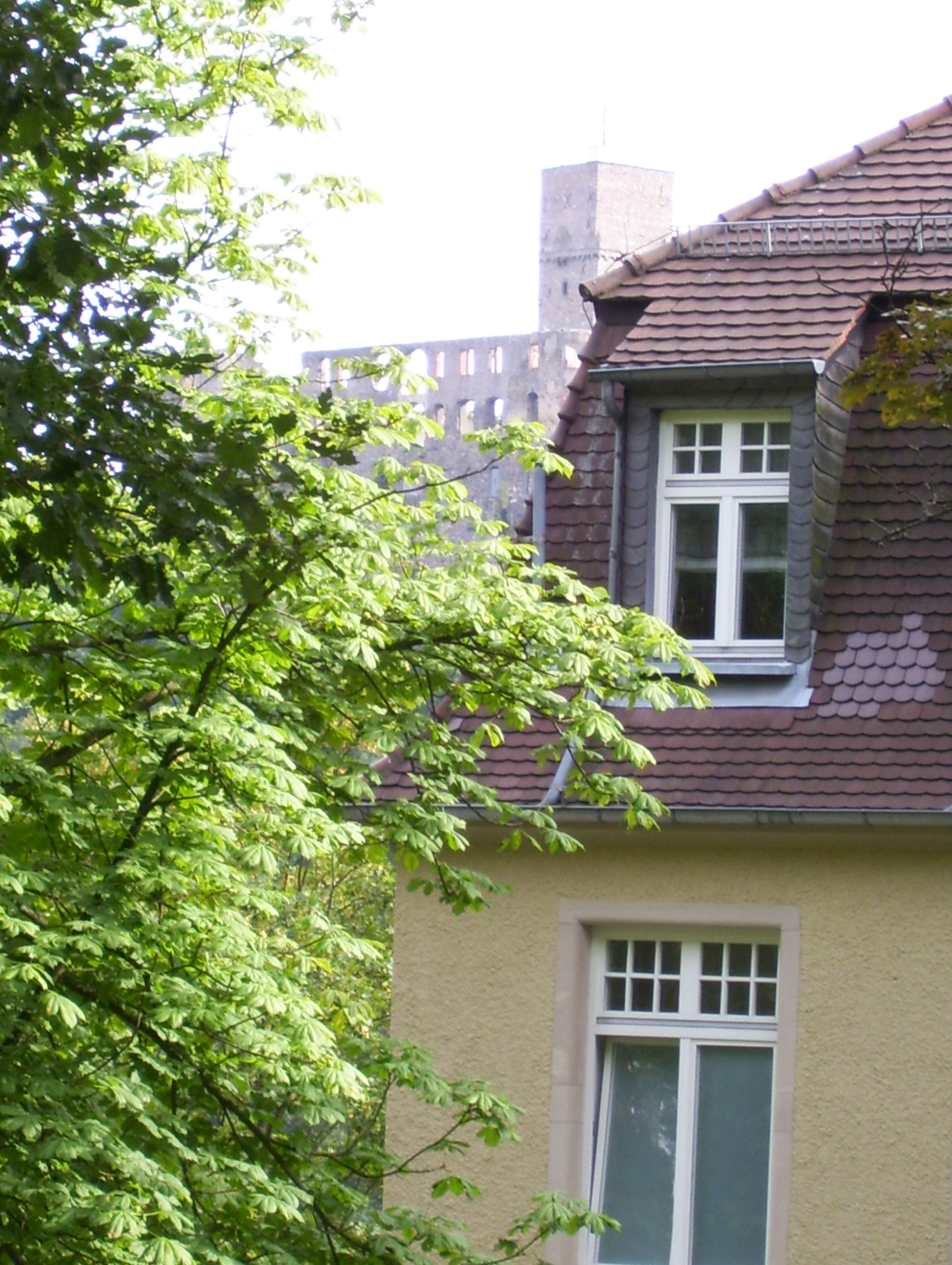 aktuelle Fotografie des Sanatoriums Dr. Kohnstamm vom Park aus aufgenommen